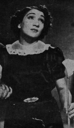 Ana María Luisa Delicias Villela Francisca de Asís González Olea2​ (Peñalolén, 4 de mayo de 19153​ - Santiago, 21 de febrero de 2008) más conocida como Ana González, una primera actriz chilena de radio, teatro, cine y televisión. Conocida popularmente como La Desideria, por su célebre personaje en el programa cómico Radiotanda de Radio Minería,3​ ganó el Premio Nacional de Arte en 1969.